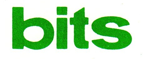 BITS